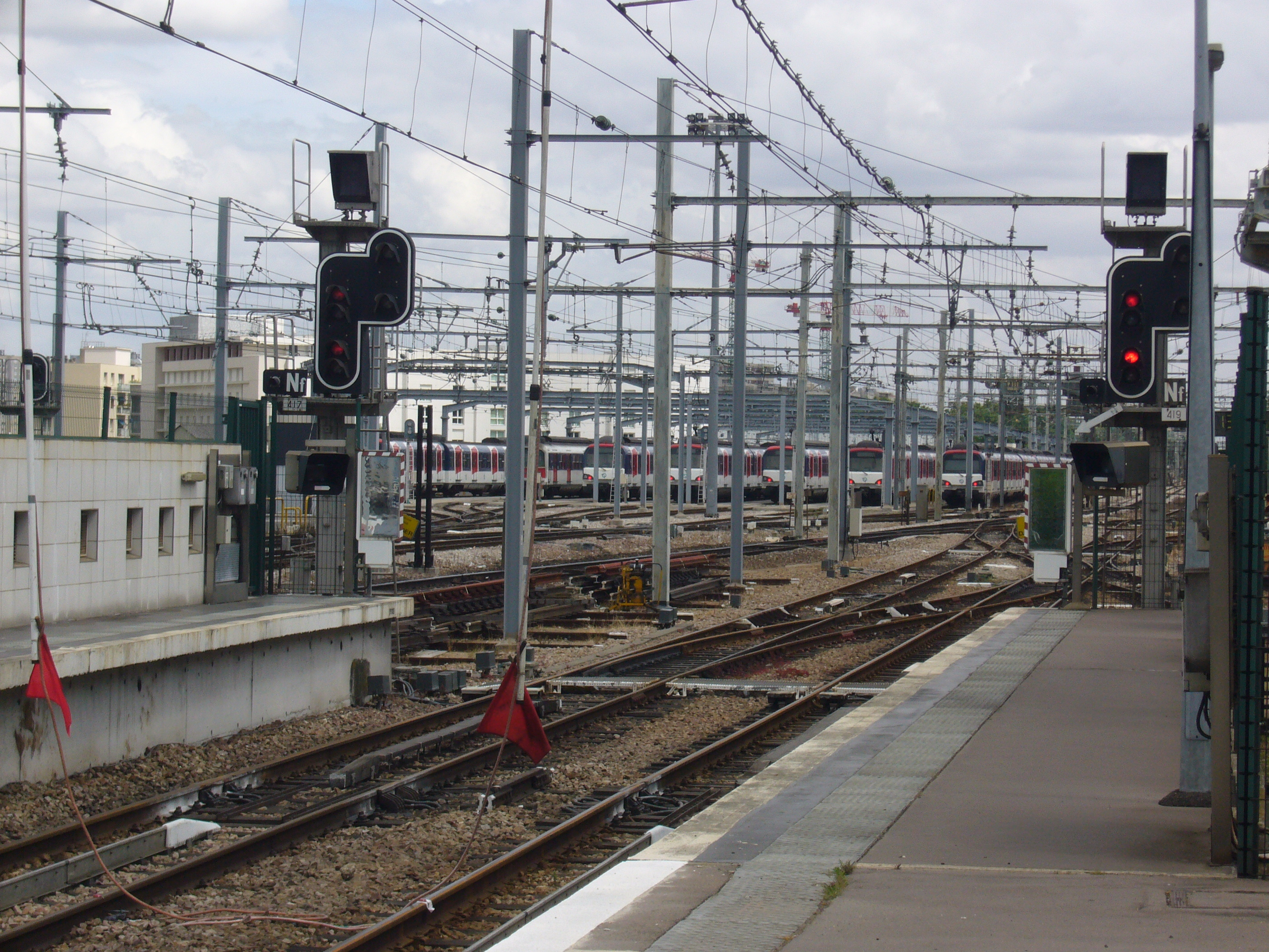 Vue des positions de garage de Rueil Malmaison depuis la Gare de Rueil Malmaison sur la ligne A du RER D'Île-de-France.